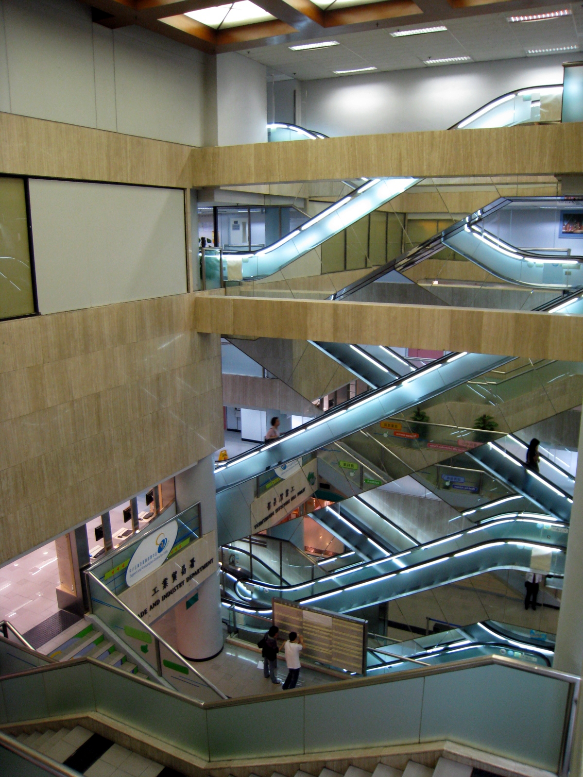 旺角中心第二期中庭 Argyle Centre Phase 2 Void